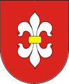 Herb Gozdowa (województwo lubelskie)